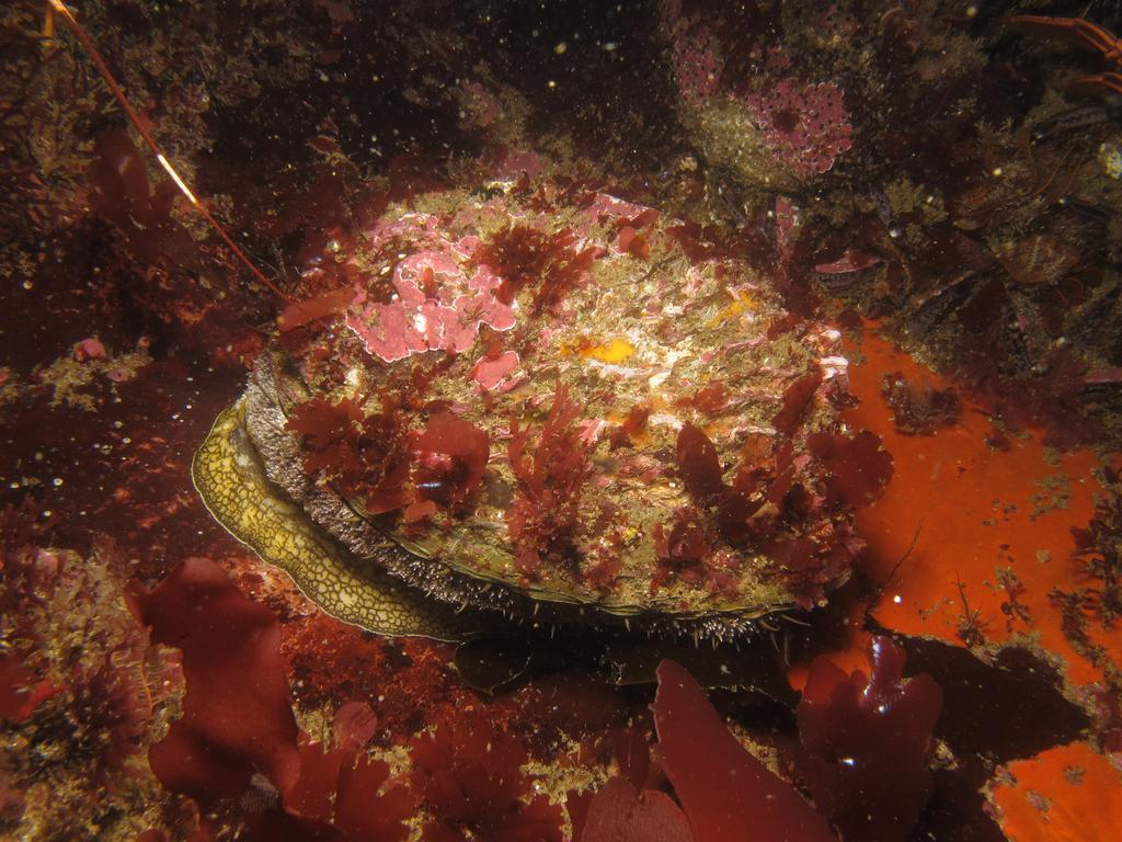 Abalone, Haliotis midae (aka perlemoen). Chapmans Peak, Western Cape, ZA.